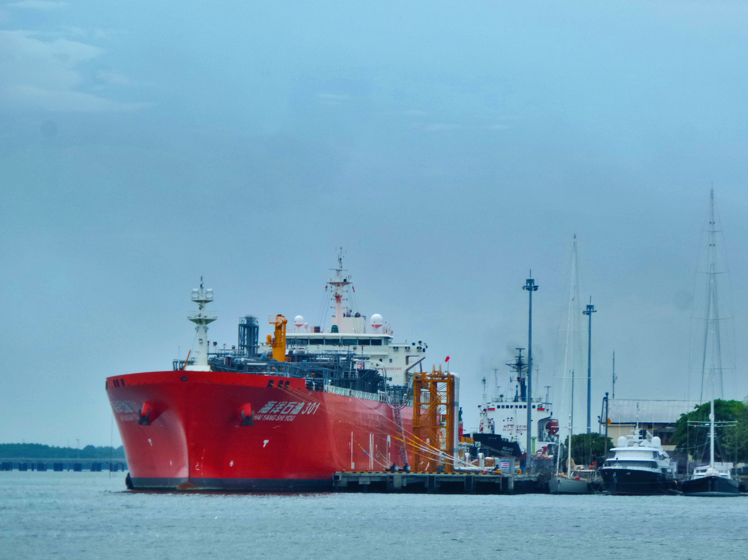 Chinese LNG tanker ship, currently docking at Benoa and still at Benoa at the day I upload this image. Kapal tanker LNG berbendera RRT, bersandar di Benoa sejak lama. Masih sampai sekarang ini.